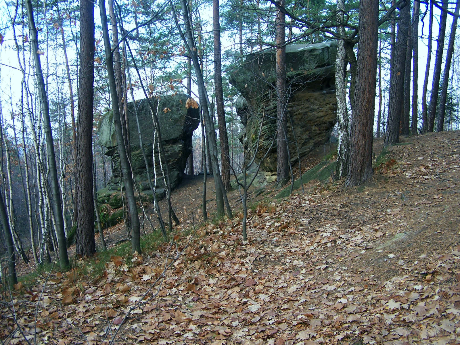 Kamienie Brodzińskiego (Paprotna, Beskid Wyspowy)